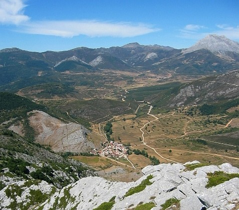 «Besande, León, Castilla y León, España, Europa». Precioso pueblo en la parte mas oriental de Leon entre las localidades de Riaño y Guardo (Palencia), perteneciente al Parque Regional Picos de Europa, en medio de los puertos de montaña "Las Portillas, Monteviejo, y Picones". Pagina Web: [1]